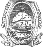 Sombrerete címere